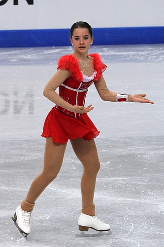 Тина Штюрцингер (Швейцария) на чемпионате мира по фигурному катанию среди юниоров 2012